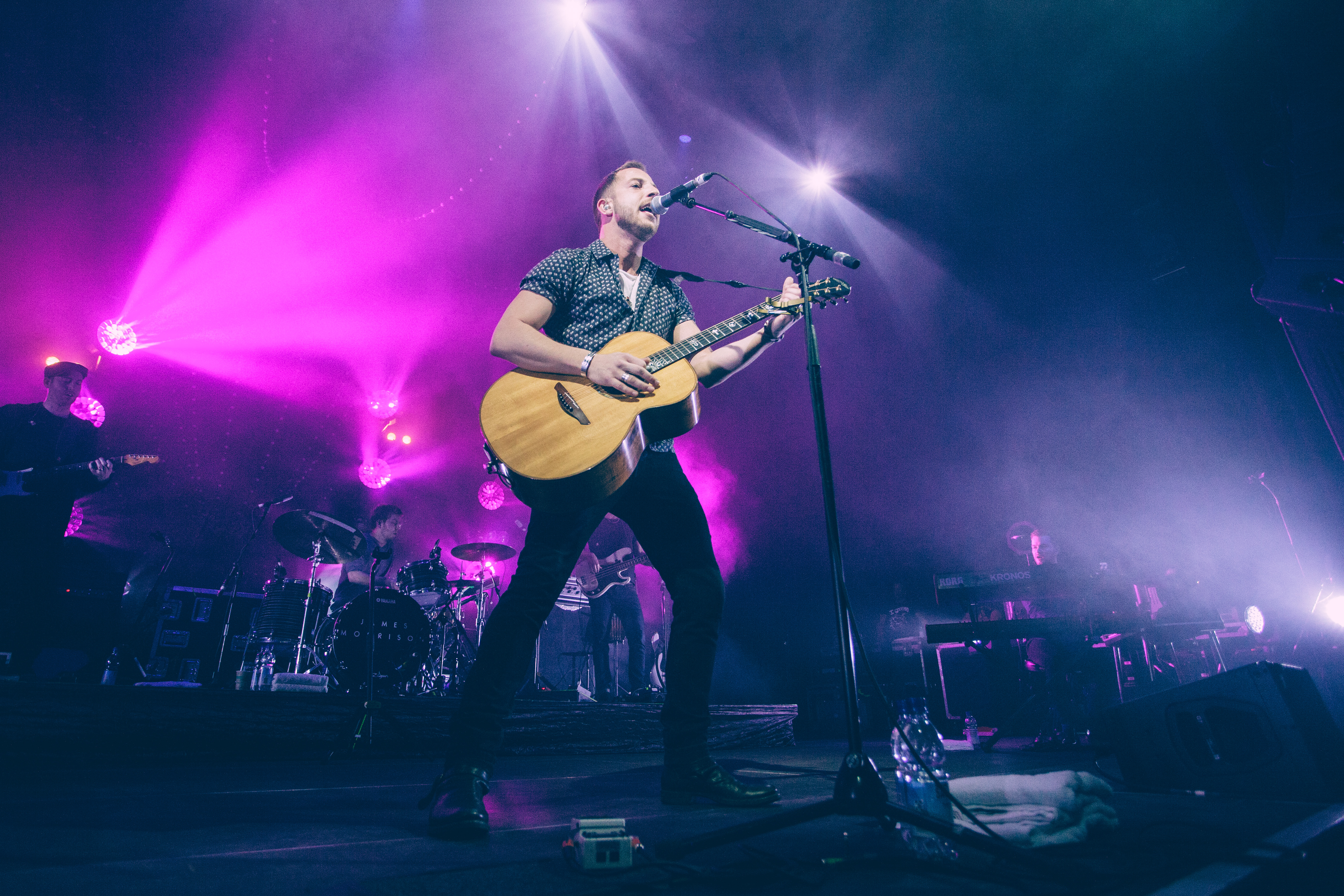 James Morrison on Higher than Here Tour (2016), E-Werk, Köln (DEU) /// leokreissig.de for NRW-Konzerte